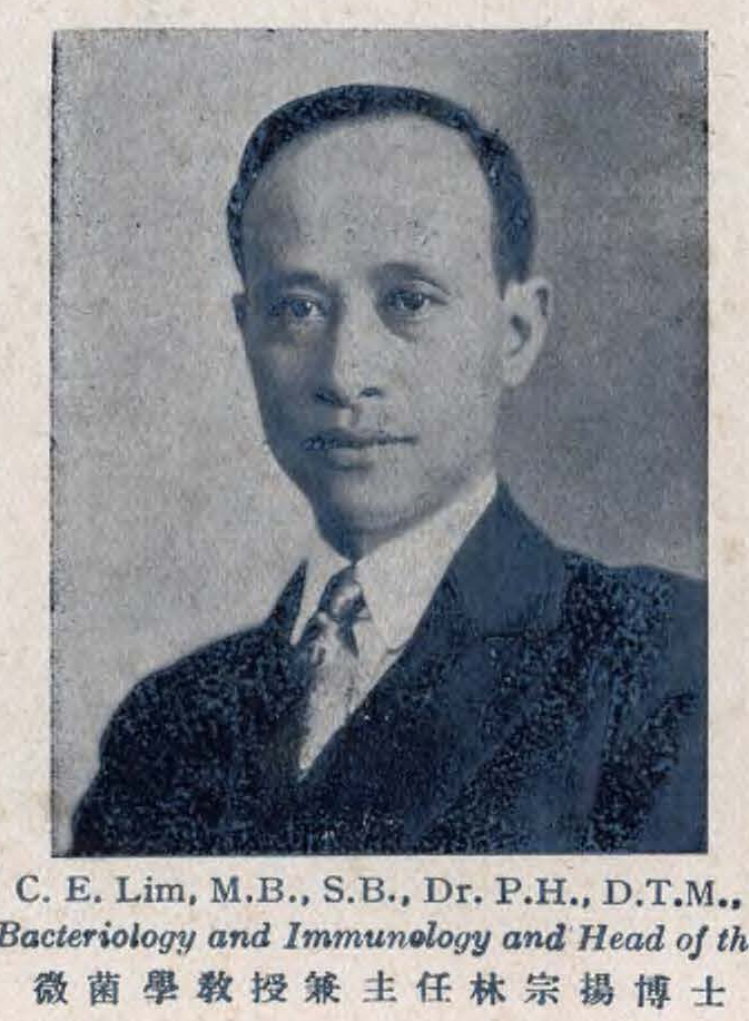 微菌學及免疫學系：微菌學敎授兼主任林宗揚博士：[照片] 《協醫校刊》 1931 年 [ 第3期 ，37頁 ]